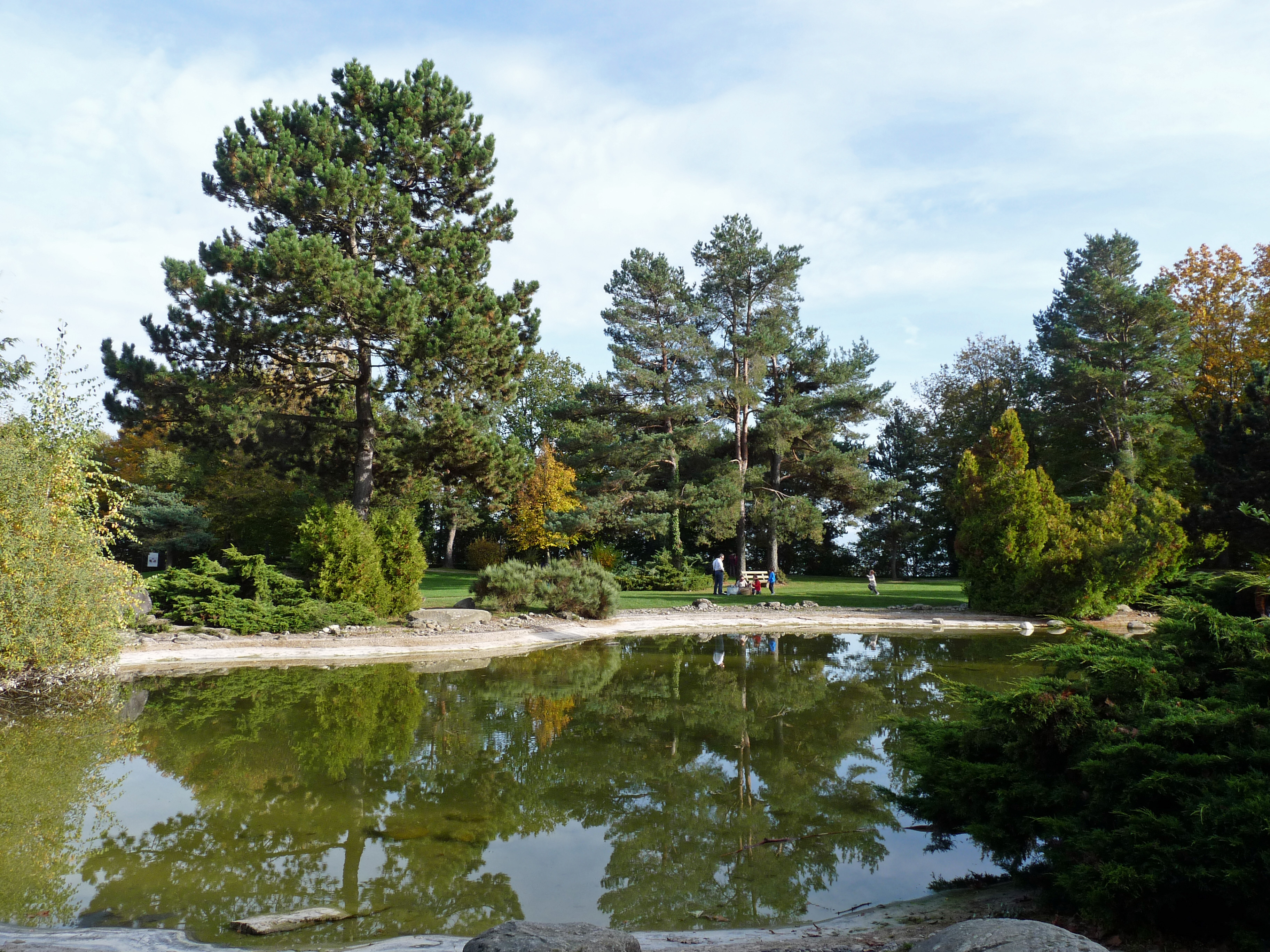 Petit plan d'eau au parc du Pré-Vert au Signal de Bougy (canton de Vaud, Suisse)